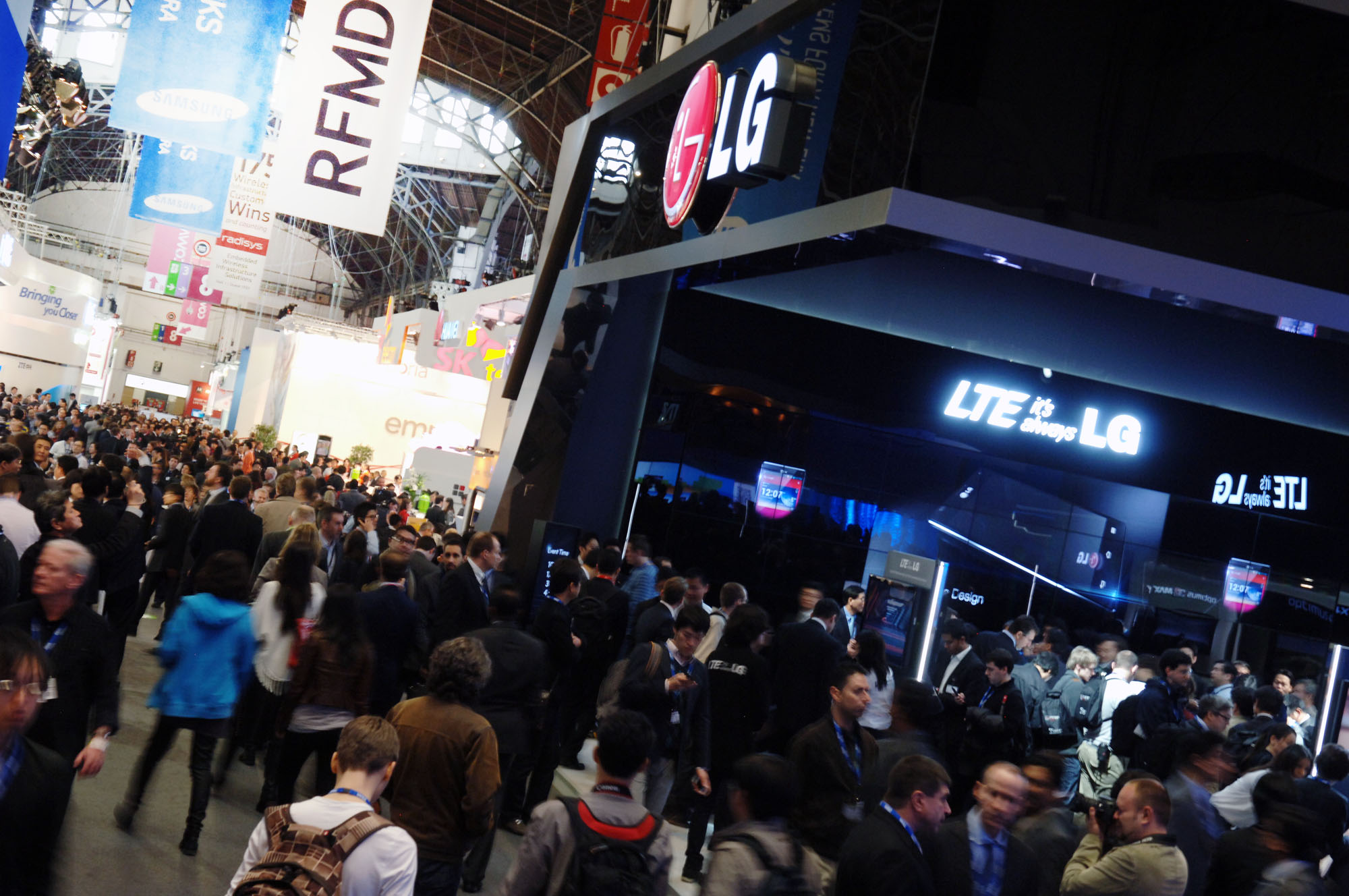 LG전자, MWC 2012 현장 스케치